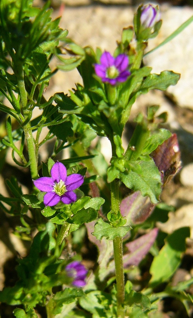 Legousia hybrida